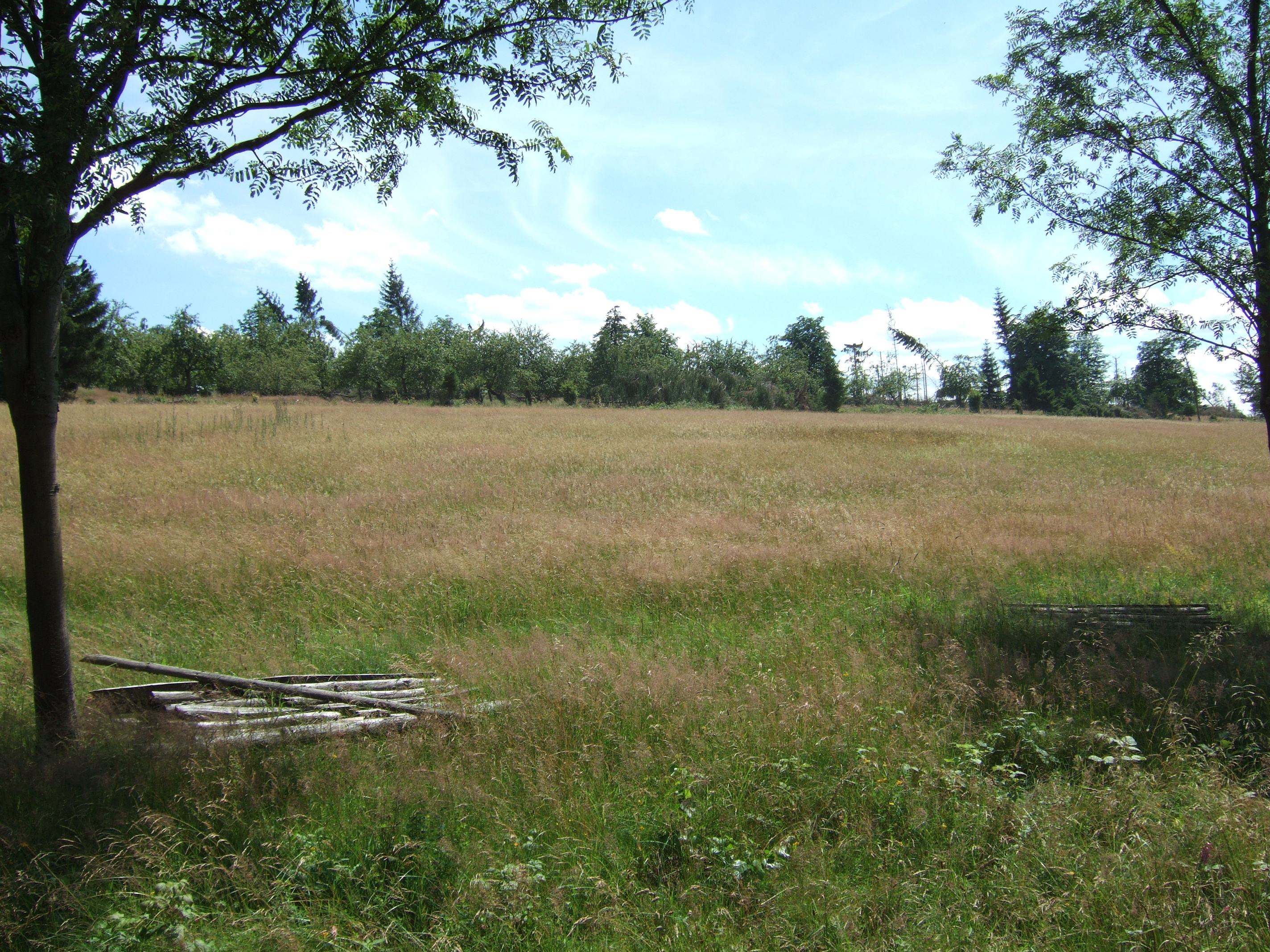 Fahrentriesch im Nationalpark Kellerwald-Edersee